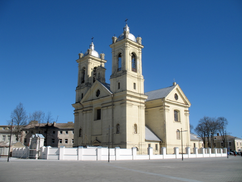 Kauno šv. Kryžiaus (Karmelitų) bažnyčia.